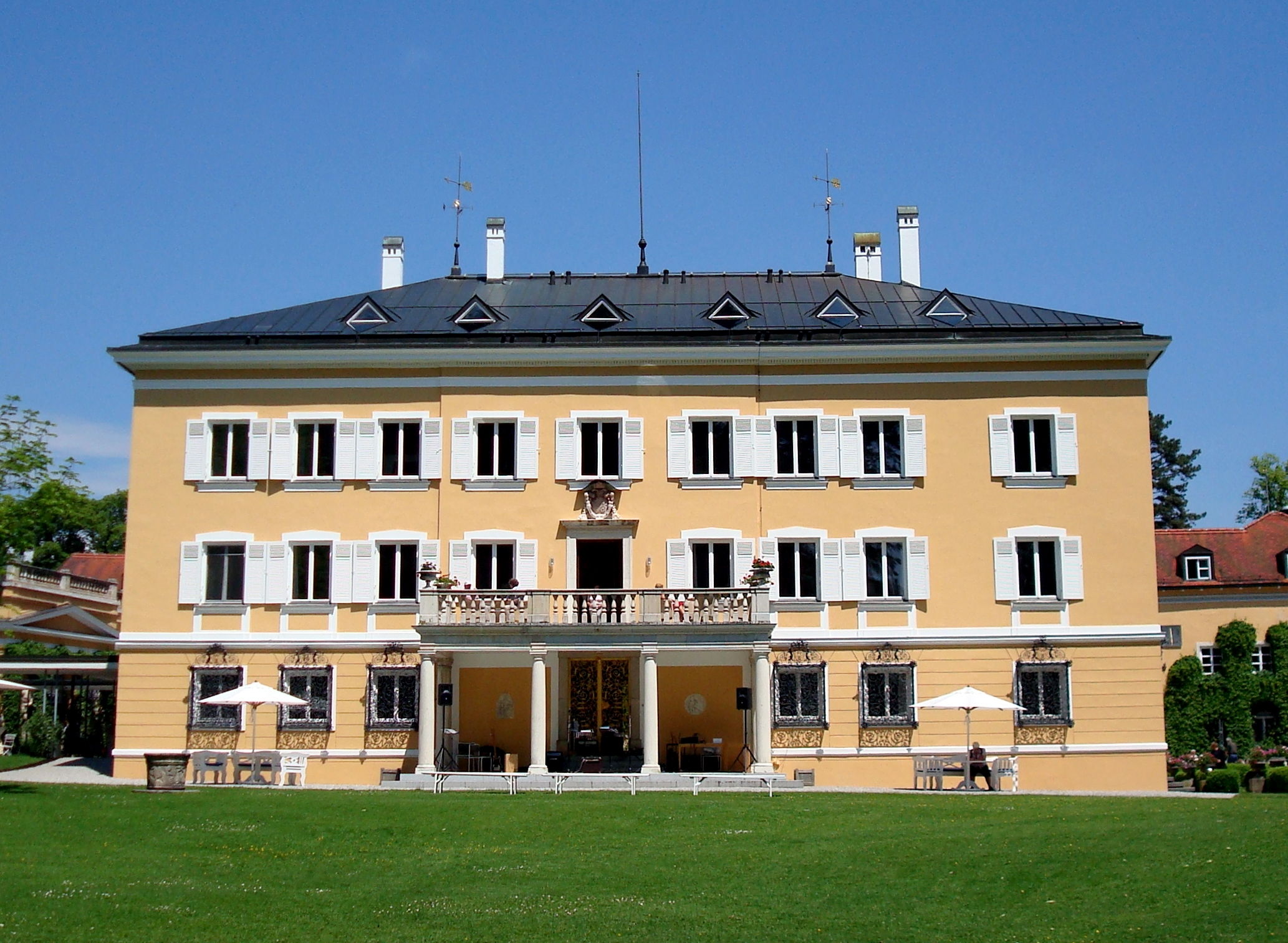 Tutzing, Schloss Tutzing. Südseite des Hauptgebäudes.